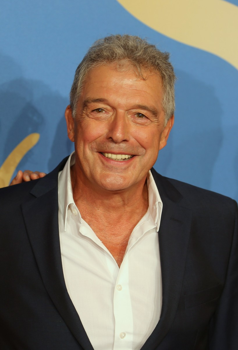 Joachim Lätsch, deutscher Schauspieler. Hier beim exklusiven Fanevent "Serienmarathon" (Sturm der Liebe, ARD) am 15. September 2015 im Mathäser Filmpalast in München auf dem roten Teppich.